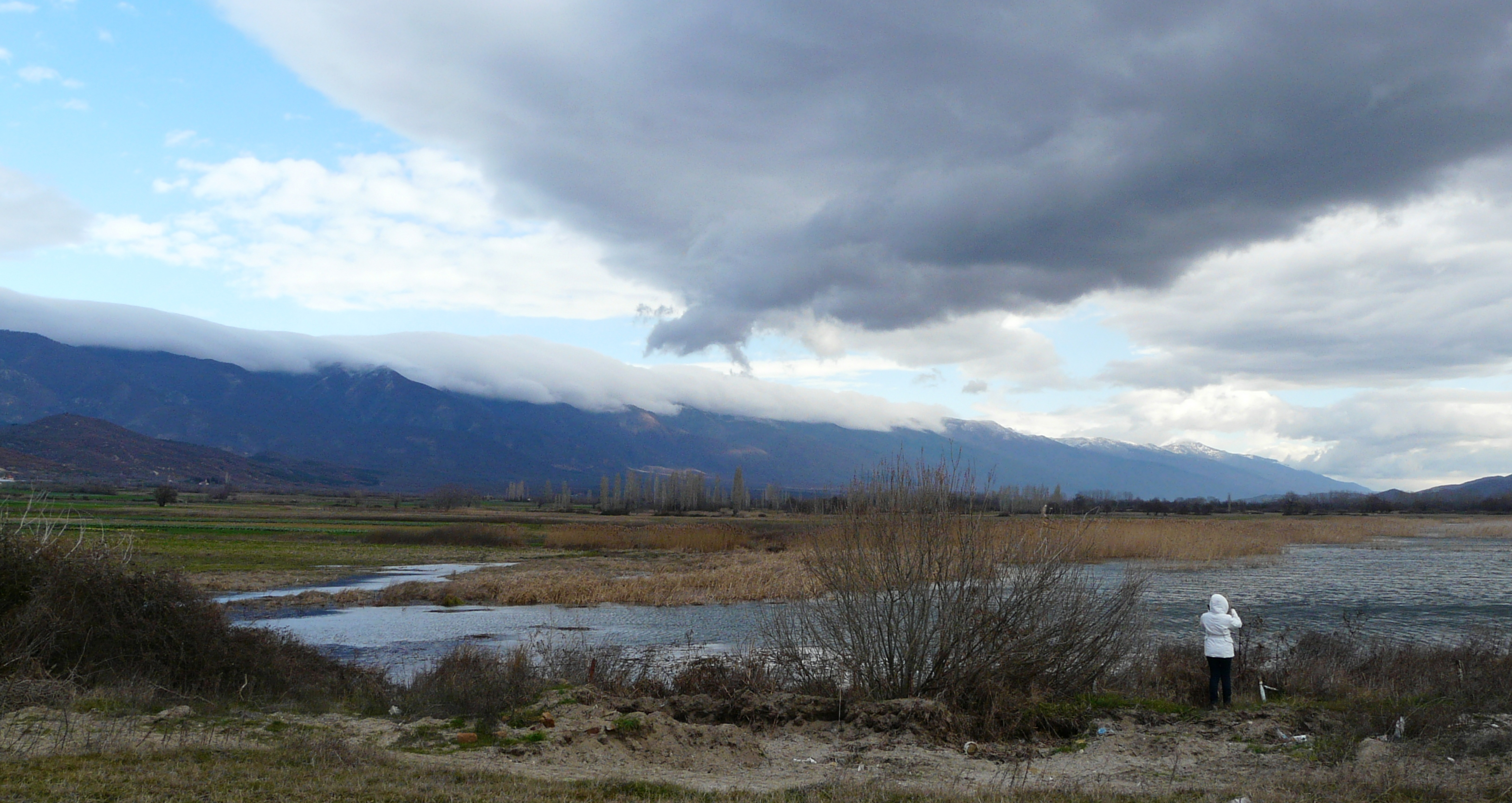 Lake Dojran, Macedonia